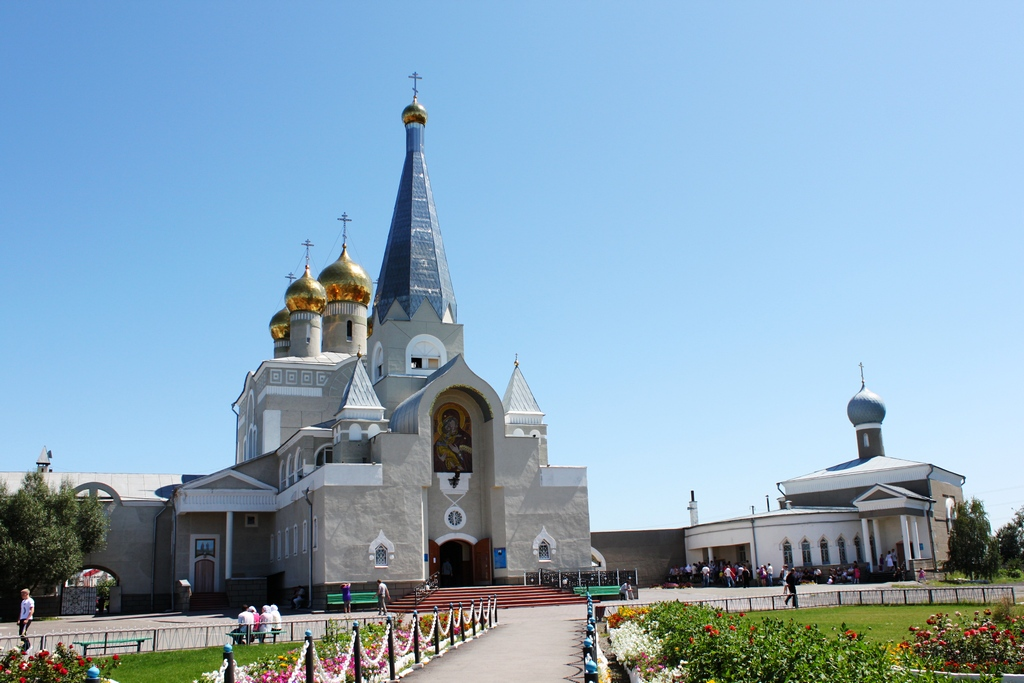 Свято-Введенский собор